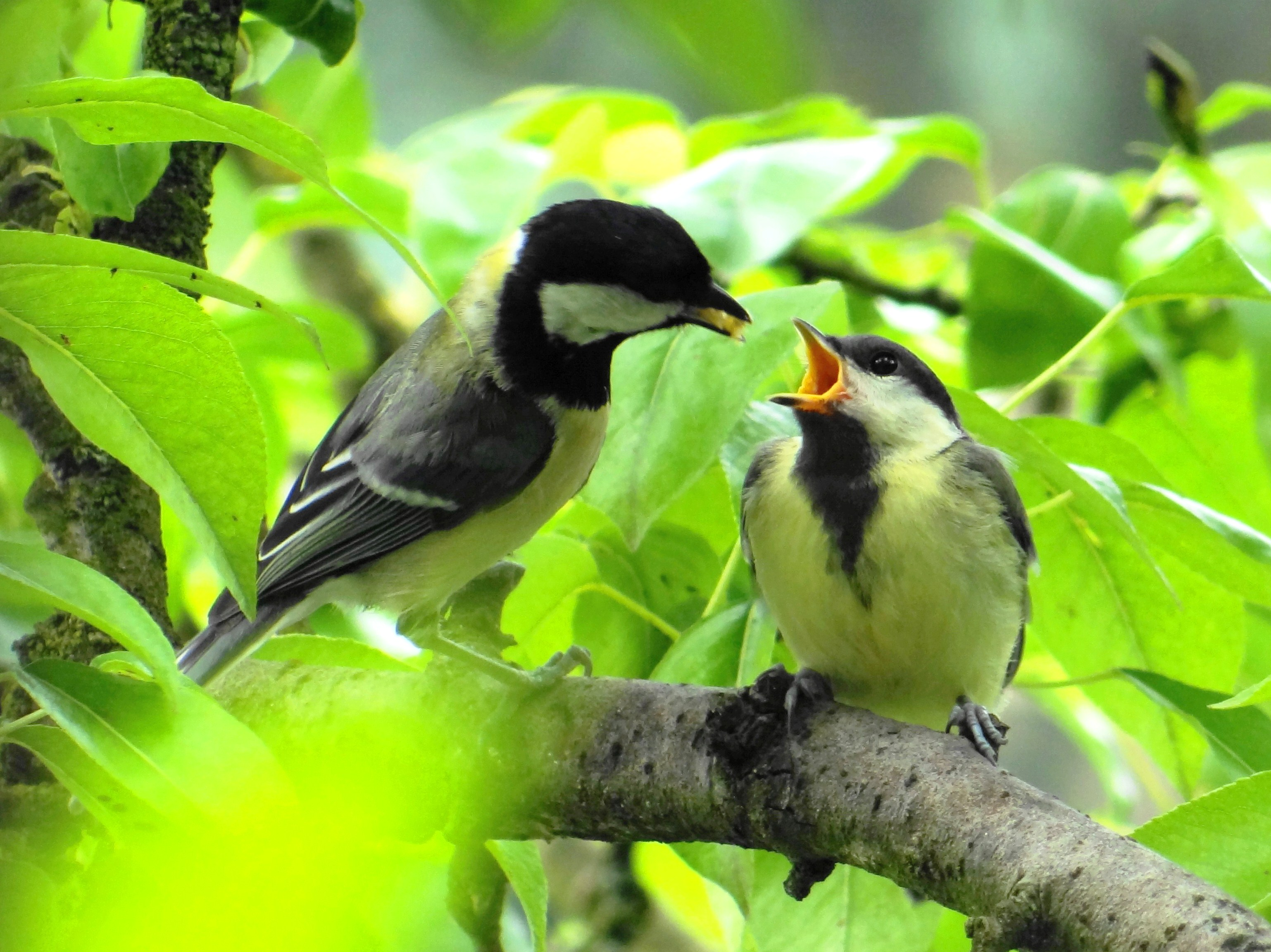 Mésange charbonnière juvénile nourrie par un parent